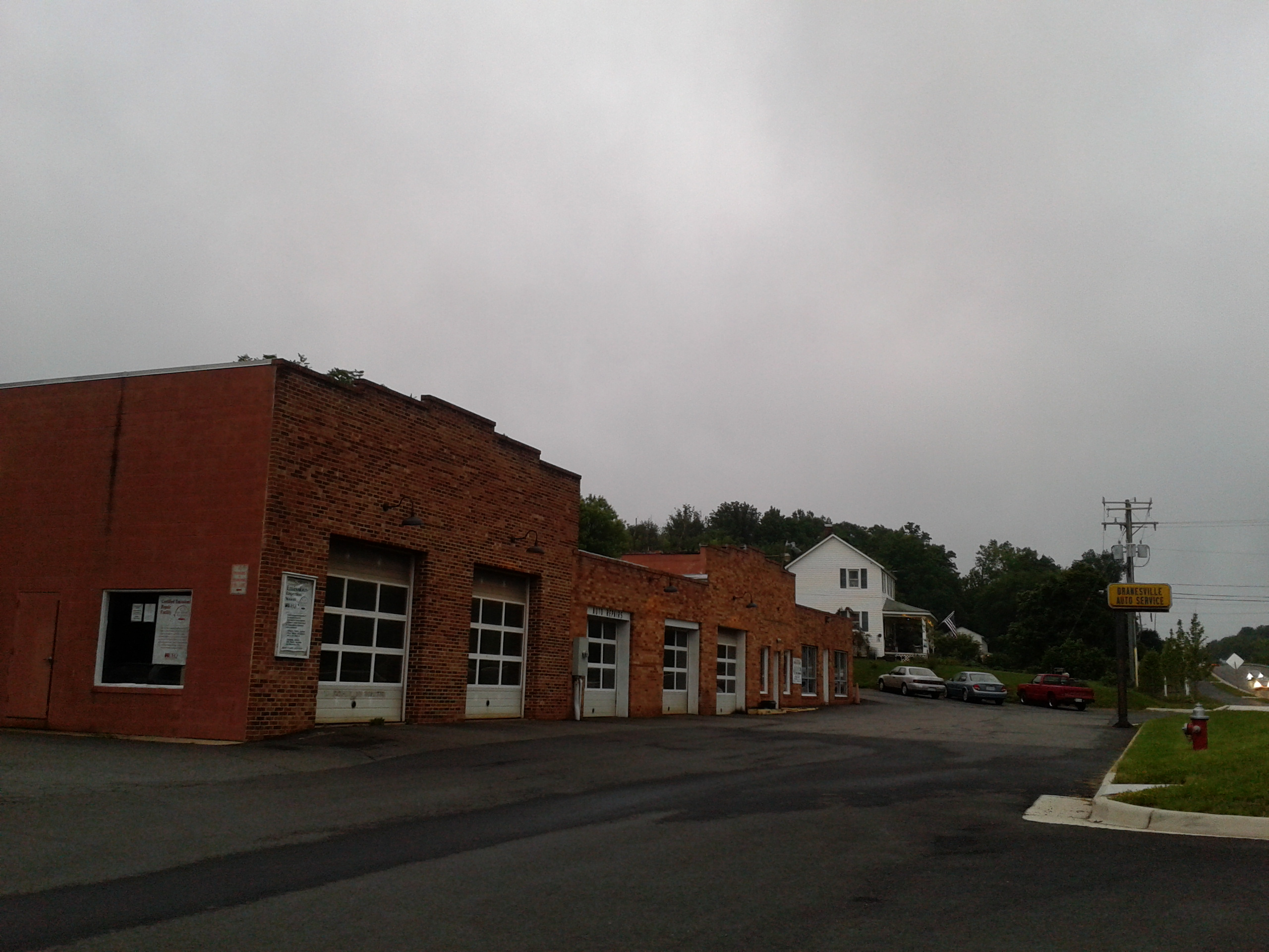 Dranesville Auto Service, Dranesville, VA